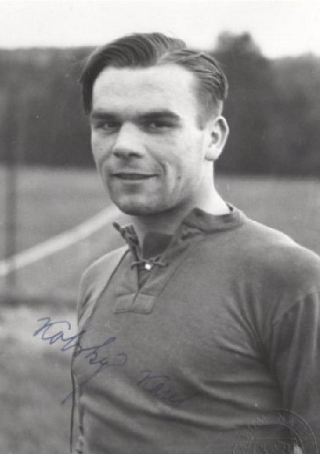 Karel Kolský (1914-1984), český fotbalista, československý reprezentant